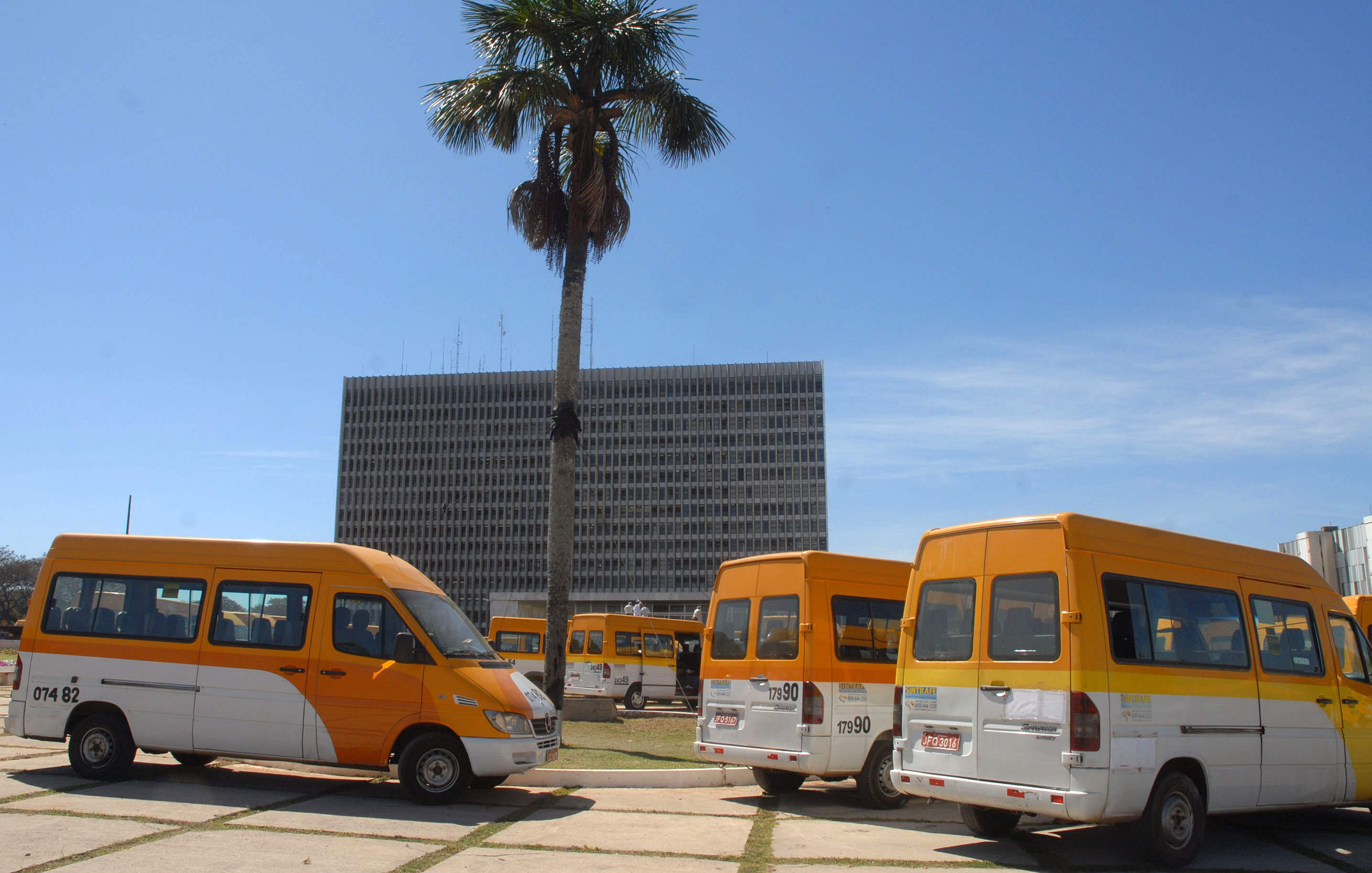 Brasília - Os motoristas das vans, que foram substituídas por micro-ônibus fazem manifestação em frente ao Palácio do Buriti, sede do Governo do Distrito Federal, para recuperar as linhas nas quais operavam.